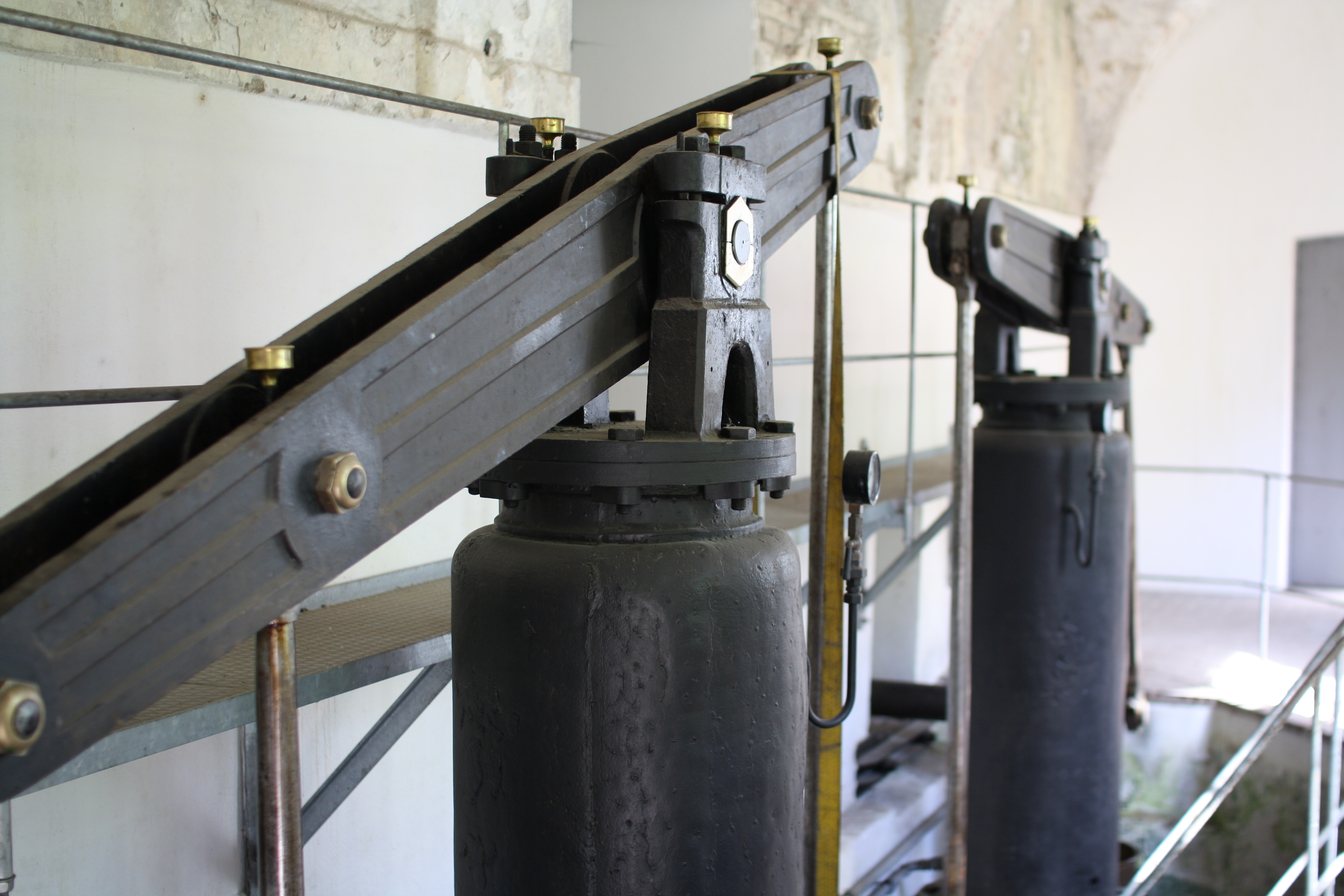 Pumpanlage des Hofbrunnwerks, München